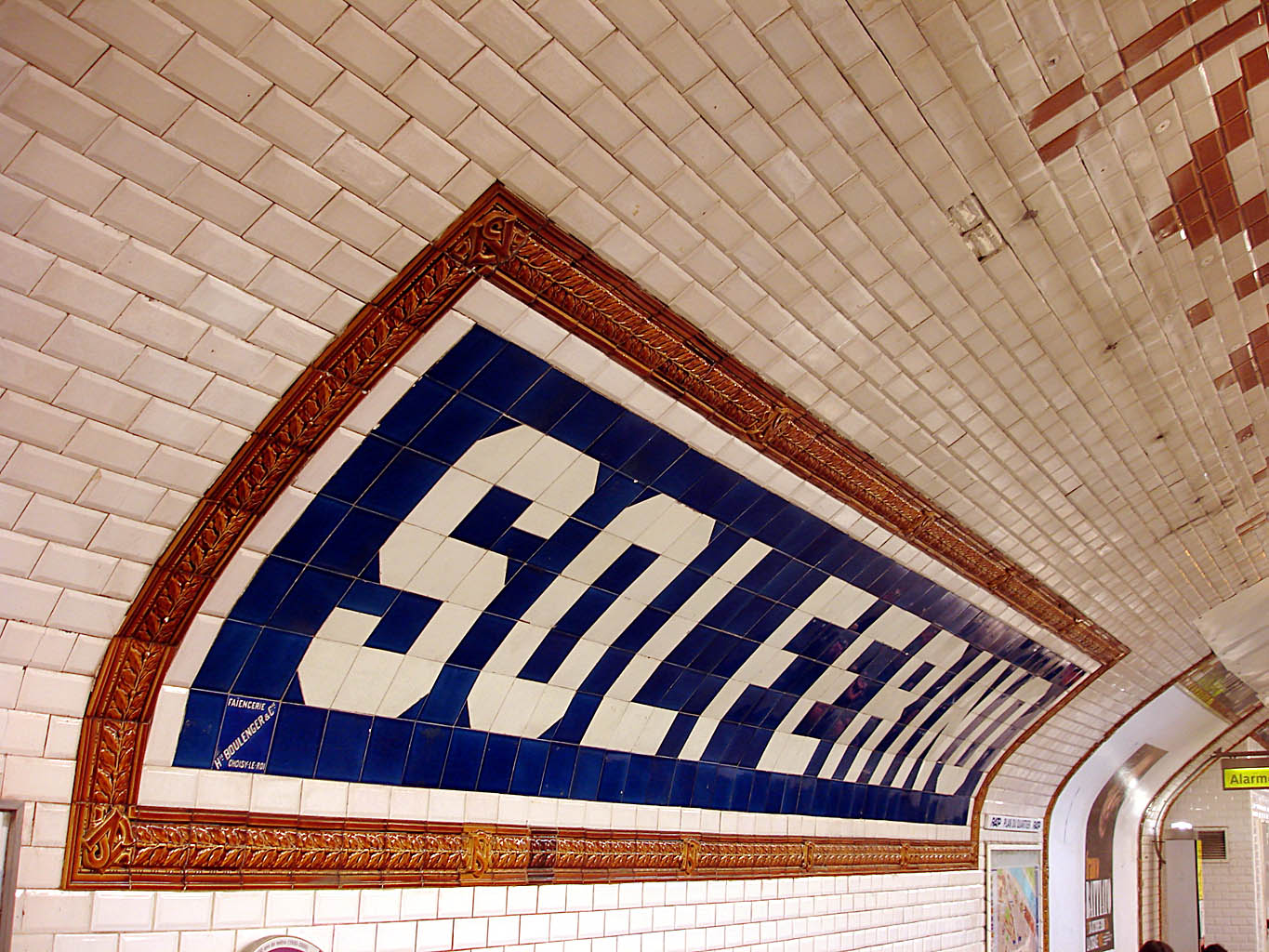 Station Solférino de la ligne 12 du métro de Paris, France.